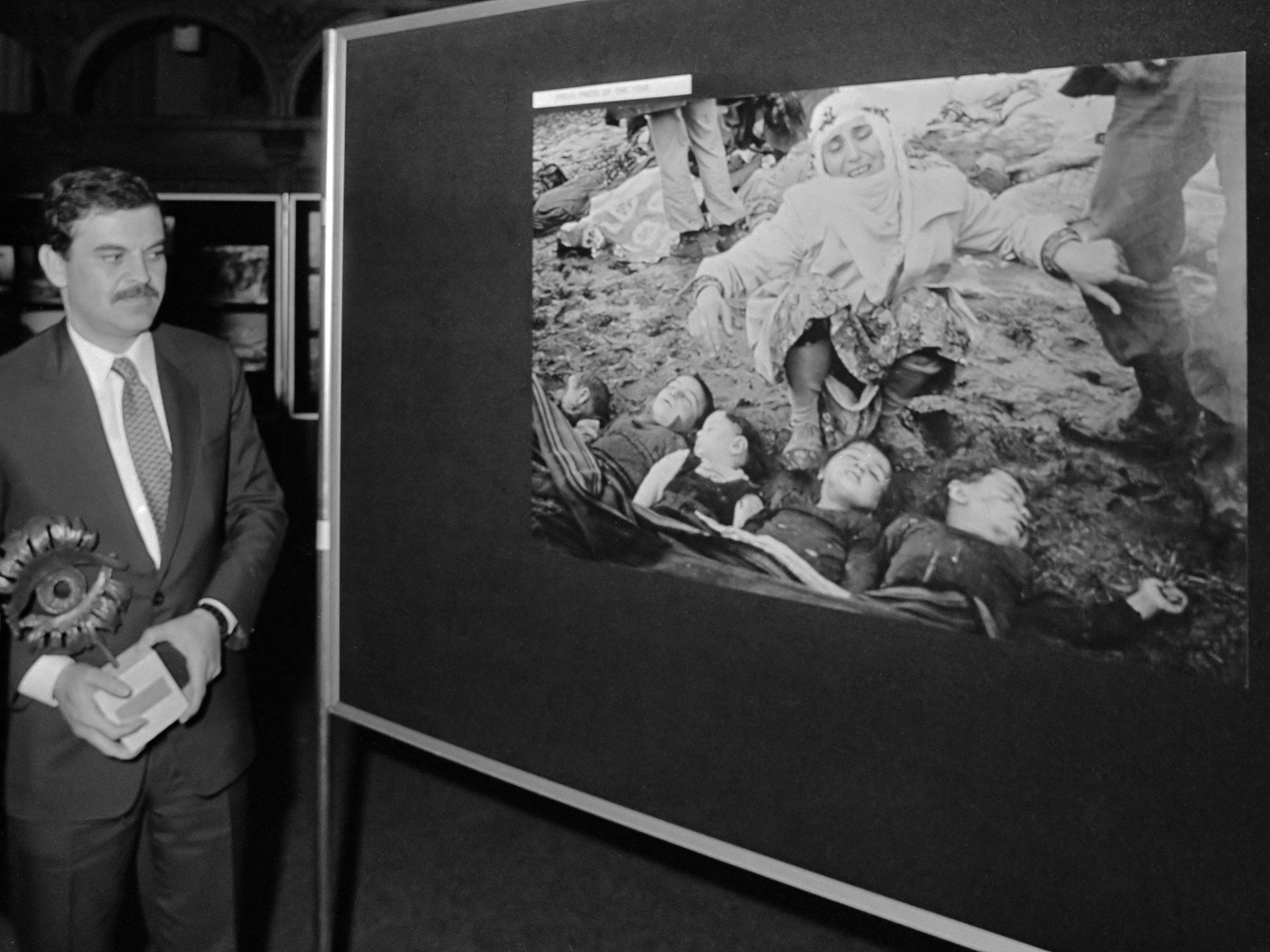 Burgemeester Van Thijn (Amsterdam) reikt hoofdprijs World Press Photo '84 uit aan Turkse fotograaf Mustafa Bozdemir 12 april 1984